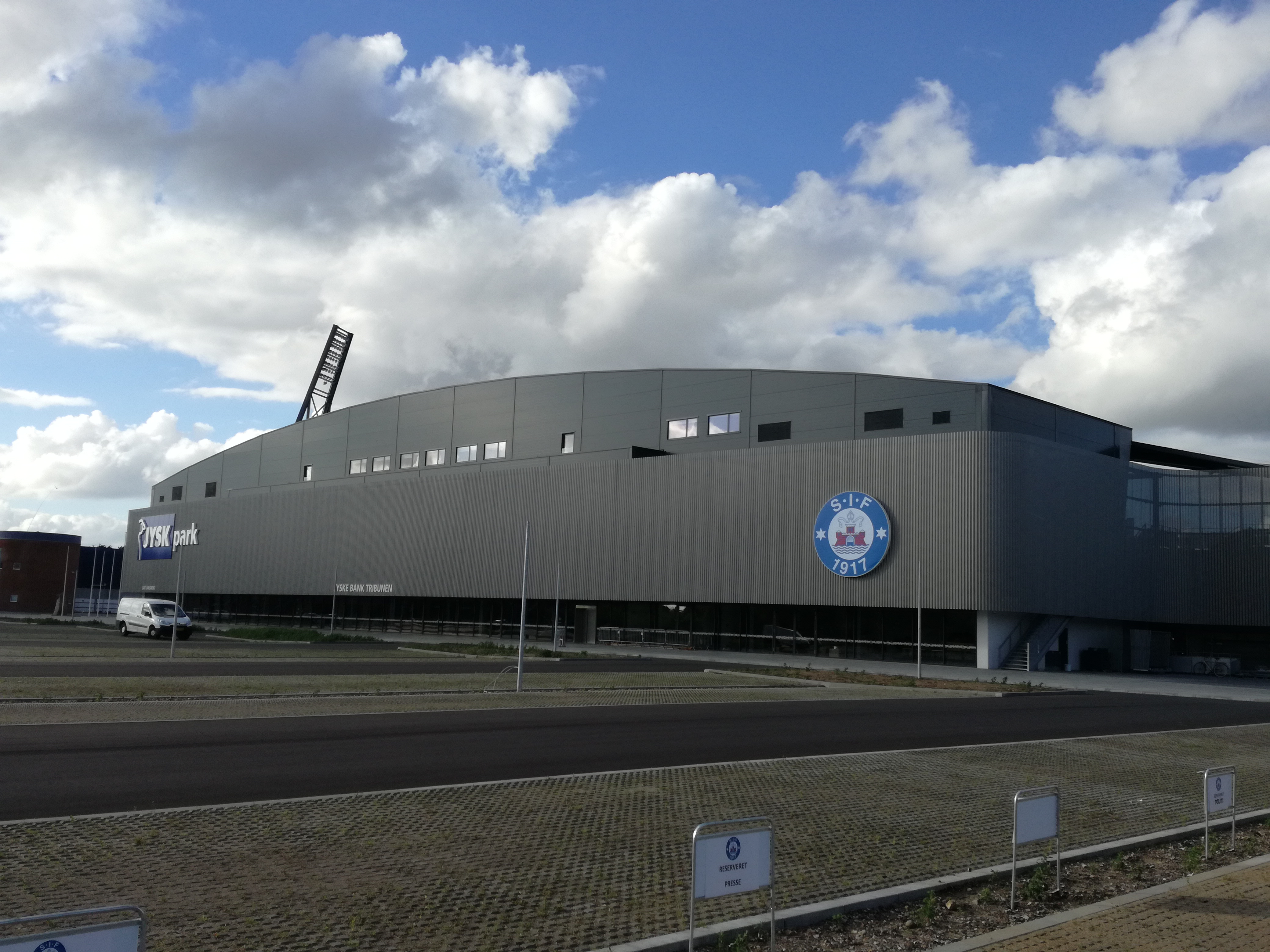 JYSK Park Silkeborg Hovedindgangen set fra parkeringspladsen